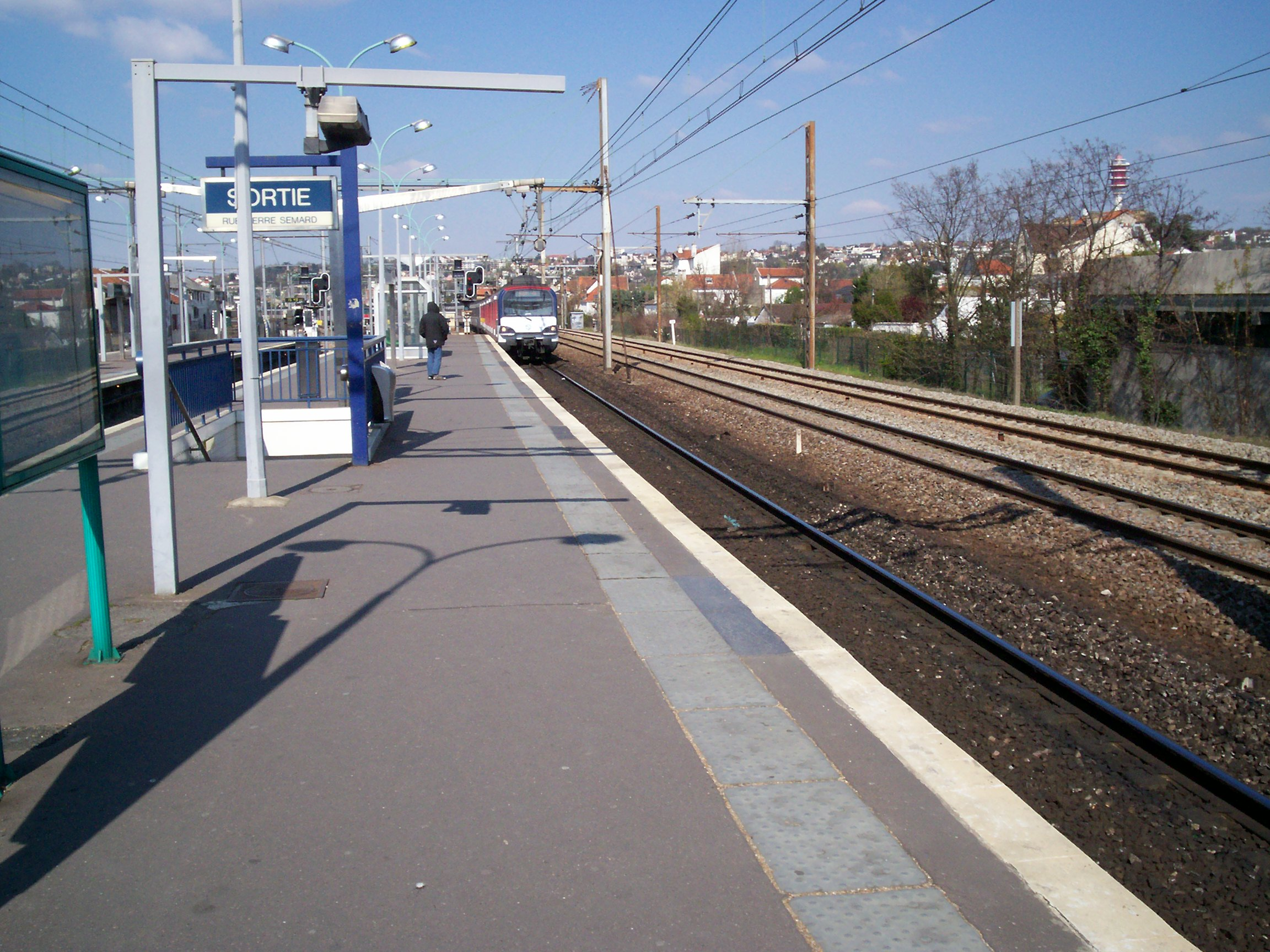 MS 61 - Gare de La Varenne-Chennevières